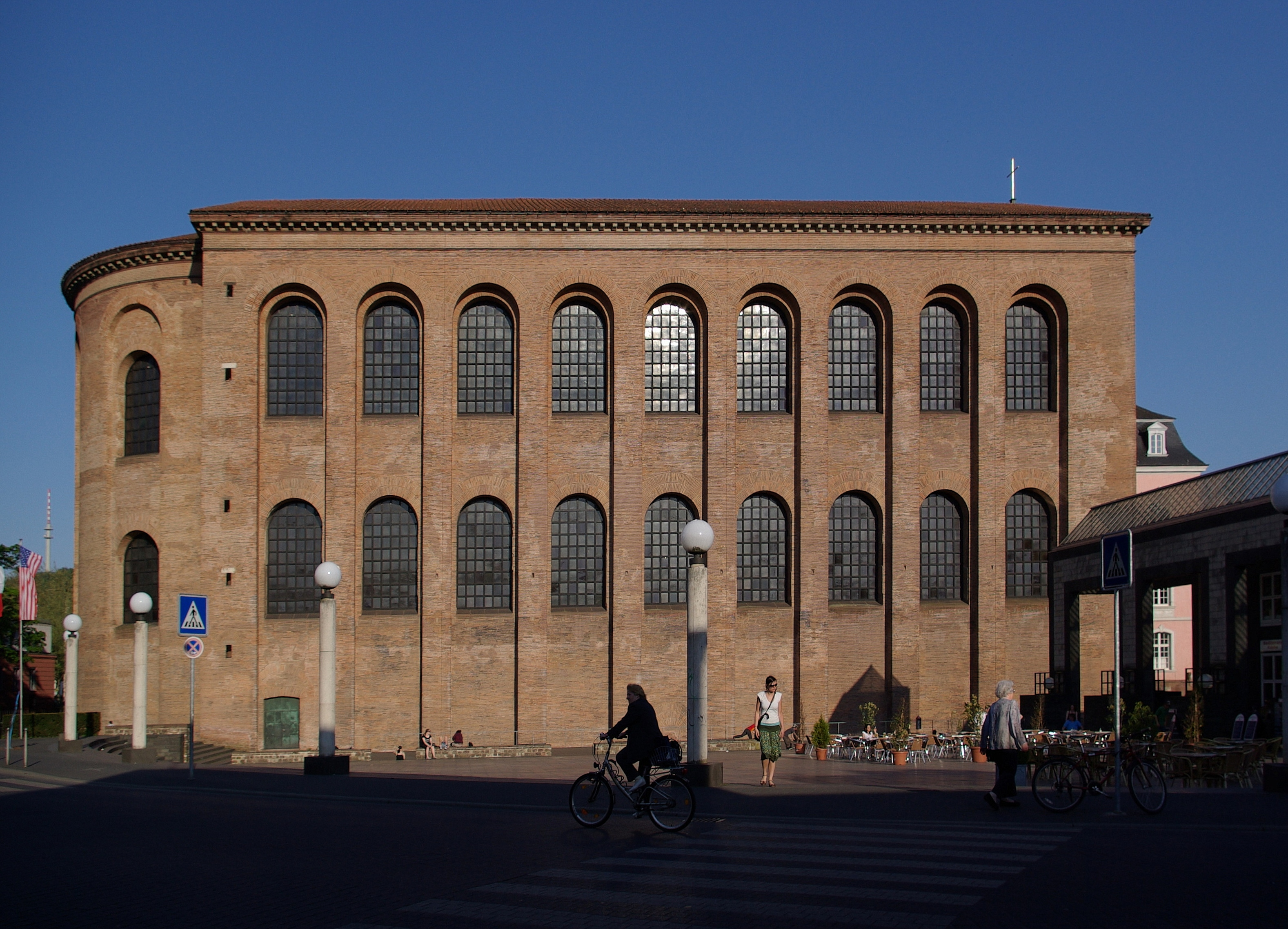 Konstantinbasilika in Trier